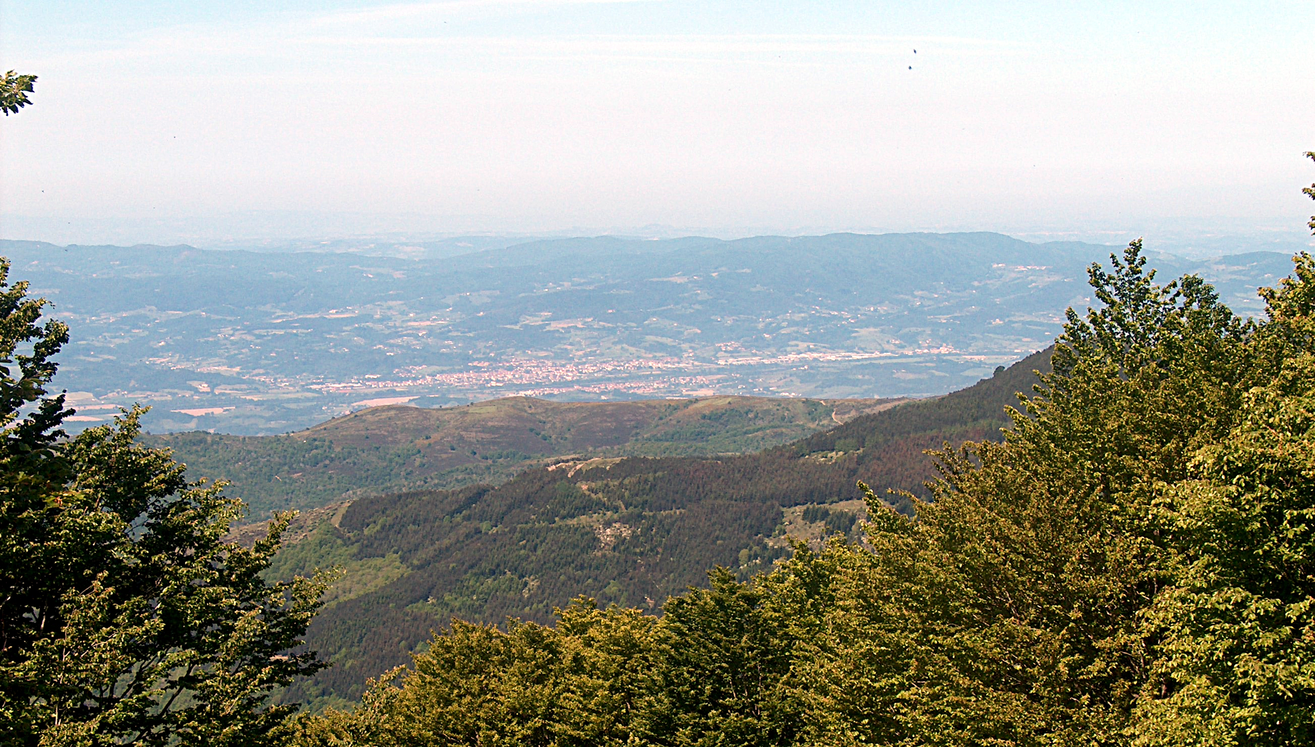 Foto del valdarno superiore scattata dal pratomagno